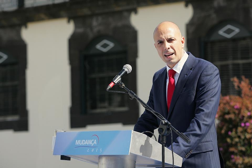 Líder